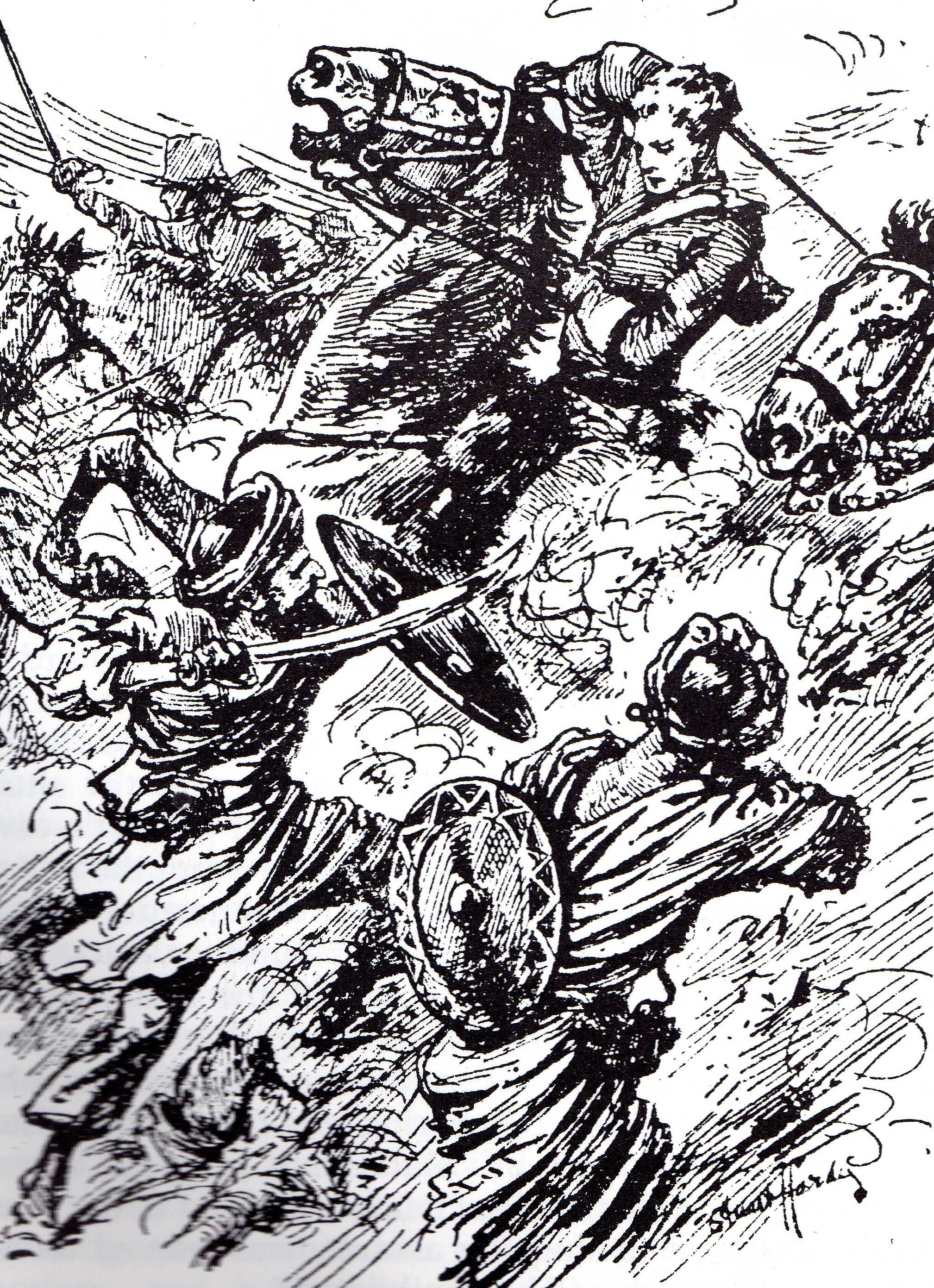 Charge de la cavalerie britannique à travers les lignes sikhs. Bataille de Sobraon. 10 février 1846. Gravure contemporaine de la bataille.